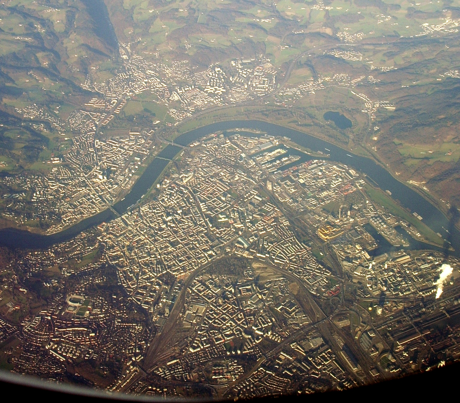 Luftbild der Stadt LinzAufnahme aus einem Verkehrsflugzeug, Linienflug